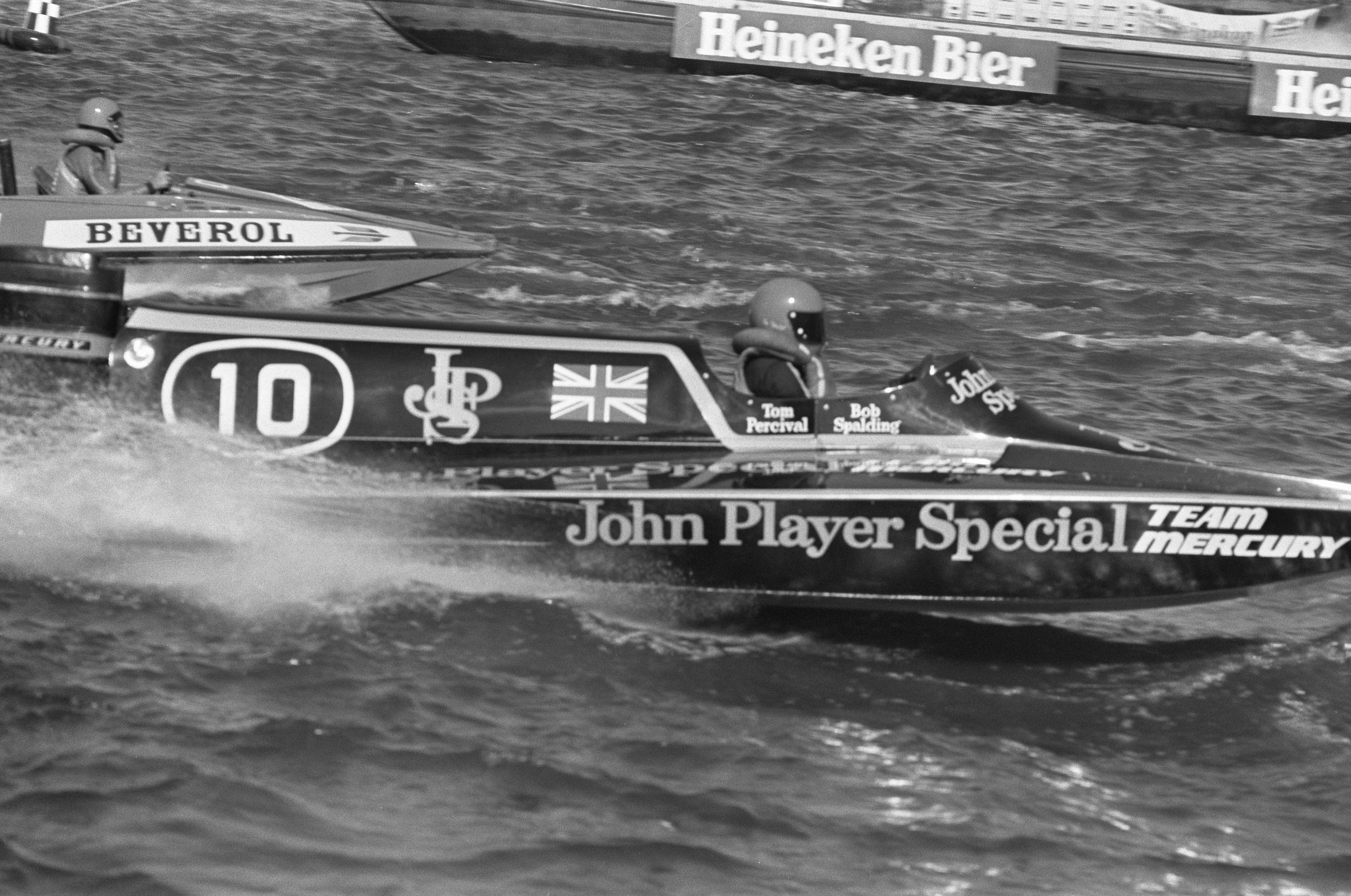 Collectie / Archief : Fotocollectie Anefo Reportage / Serie : [ onbekend ] Beschrijving : Speedboatraces drie uren van Amsterdam ; no 10 Tom Percival Datum : 21 september 1975 Locatie : Amsterdam Trefwoorden : Speedbootraces Persoonsnaam : Percival, Tom Fotograaf : Bogaerts, Rob / Anefo Auteursrechthebbende : Nationaal Archief Materiaalsoort : Negatief (zwart/wit) Nummer archiefinventaris : bekijk toegang 2.24.01.05 Bestanddeelnummer : 928-1635